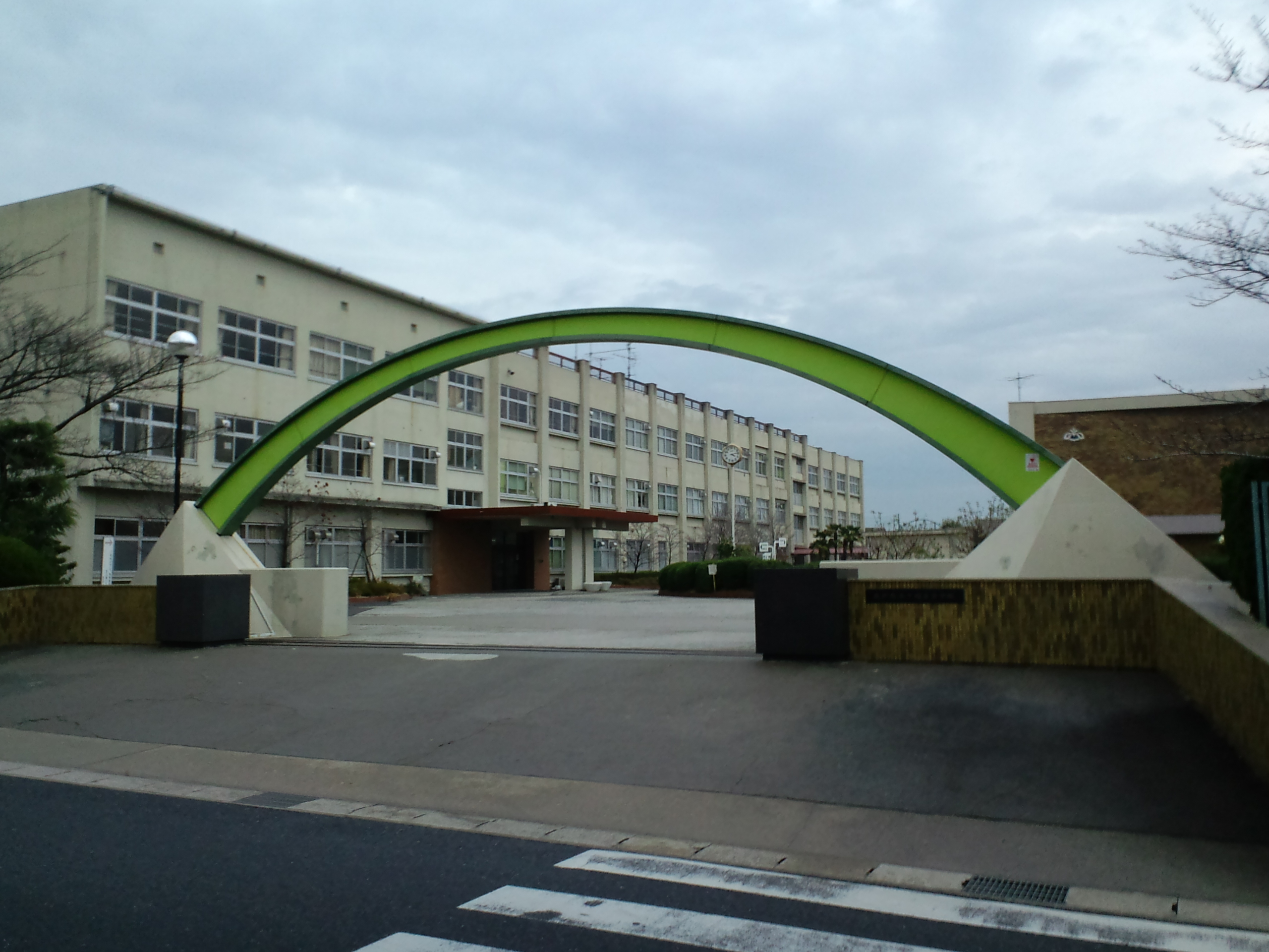 愛知県立千種高校の写真です。